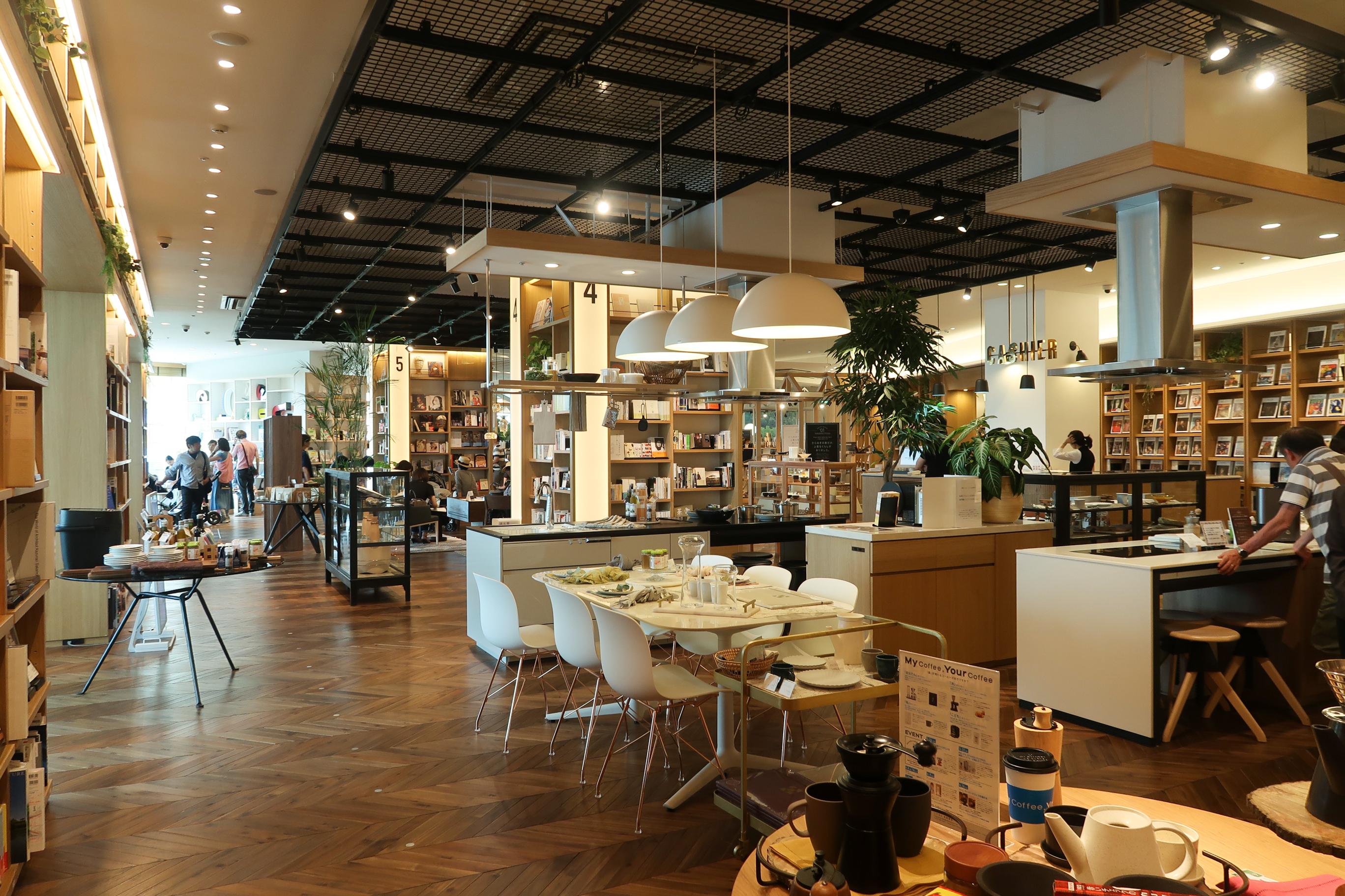 Futago-Tamagawa Tsutaya Electrics interior